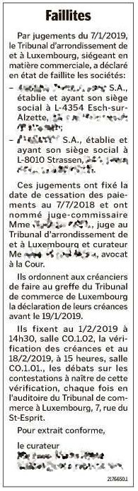 Luxembourg, avis officiel publié dans la presse déclarant des entreprises en état de faillite (Données sur les entreprises anonymisées).